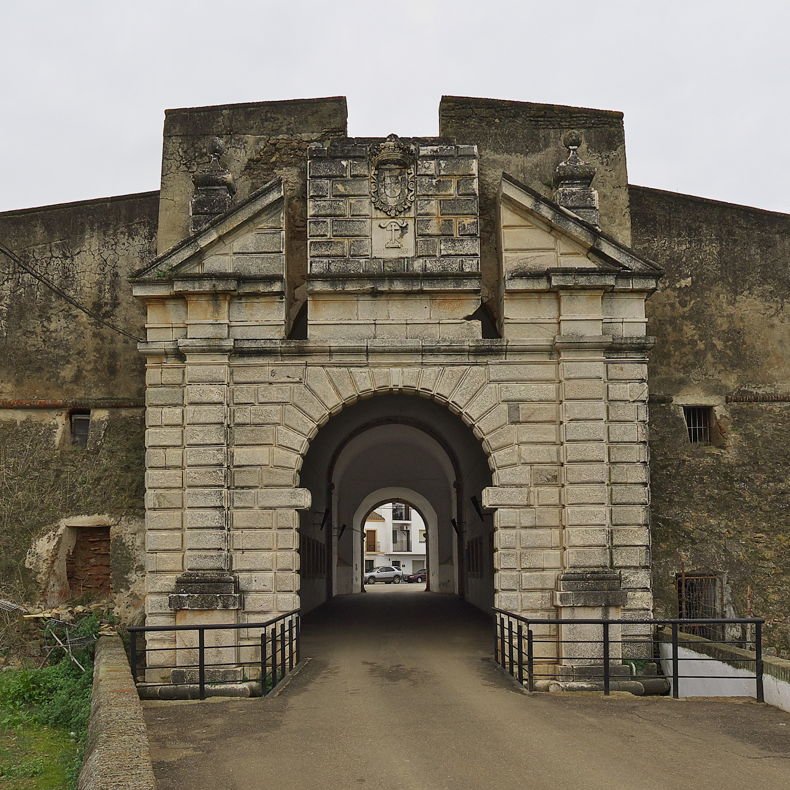 Única puerta que se conserva del baluarte, construída en mármol almohadillado (1703)